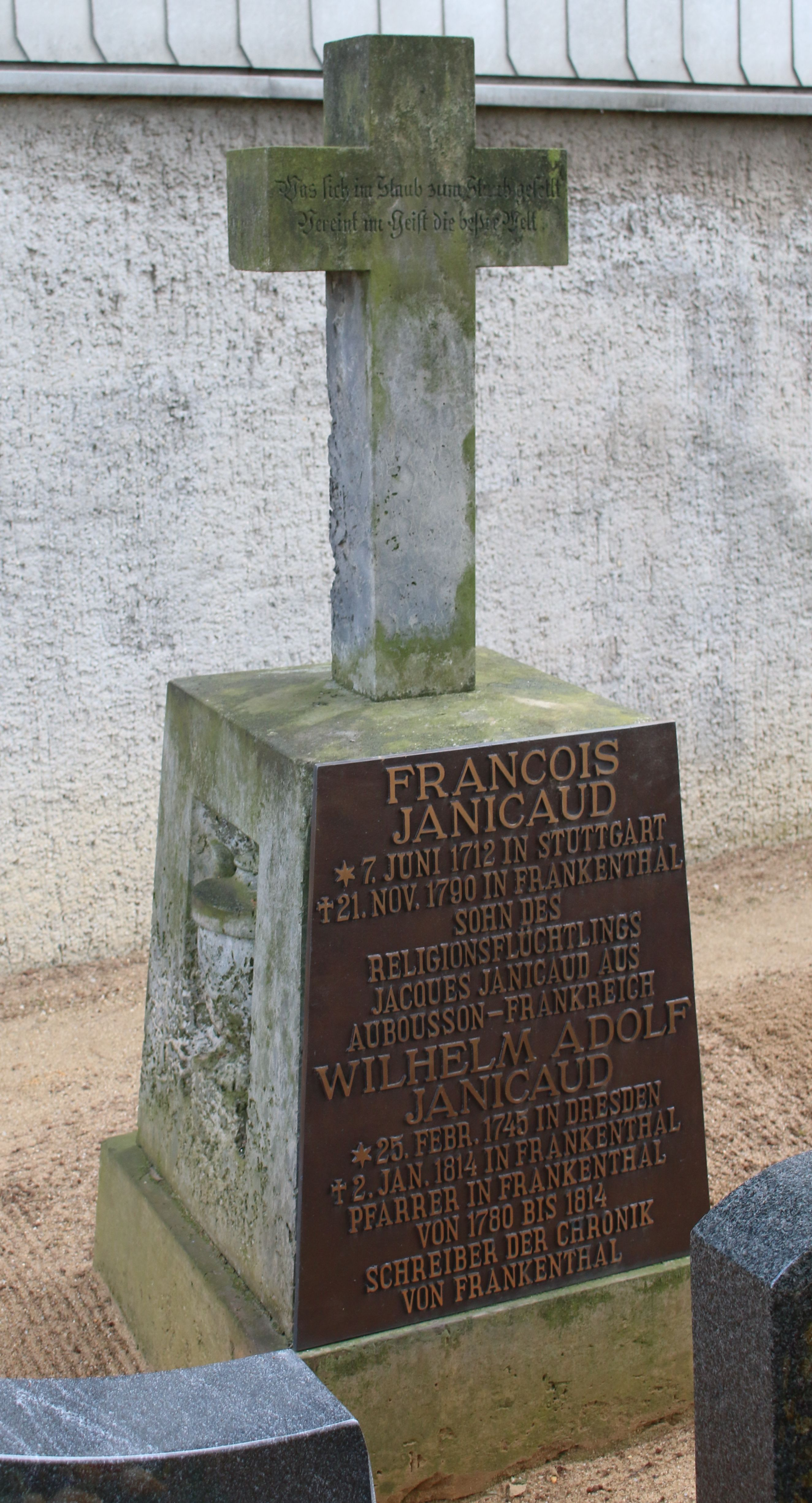 Grabmal oder Gedenkstein mit Gedenktafel an (Jacques,) Francois und Wilhelm Adolf Janicaud auf dem Kirchhof in Frankenthal, Sachsen. Inschrift: Was sich im Staub zum Staub gesellt Vereint im Geist die beßre Welt Francois Janicaud * 7. Juni 1712 in Stuttgart † 21. Nov. 1790 in Frankenthal Sohn des Religionsflüchtlings Jacques Janicaud aus Aubousson – Frankreich Wilhelm Adolf Janicaud * 25. Febr. 1745 in Dresden † 2. Jan. 1814 in Frankenthal Pfarrer in Frankenthal von 1780 bis 1814 Schreiber der Chronik von Frankenthal